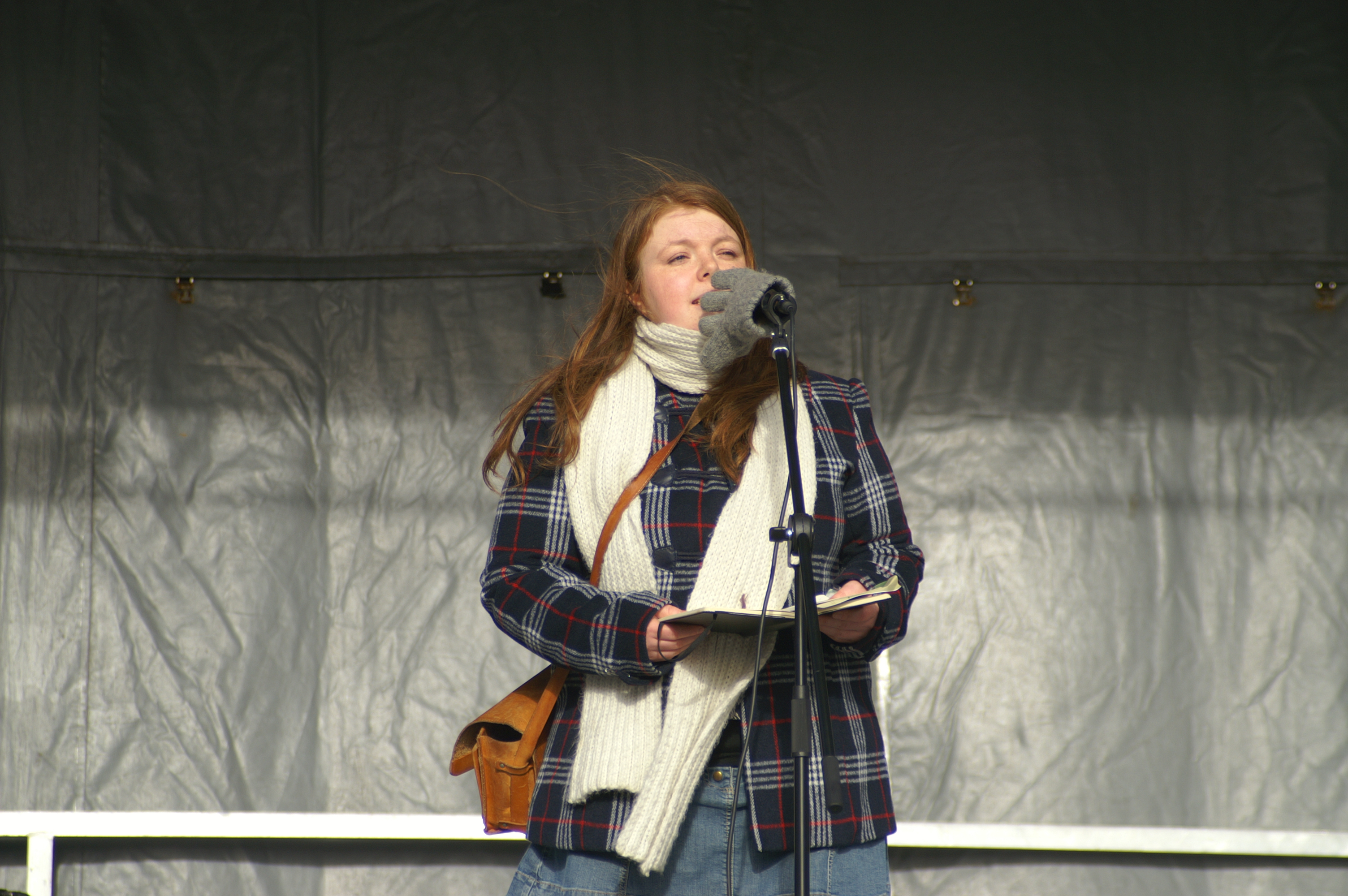 Gina Barstad 8. mars